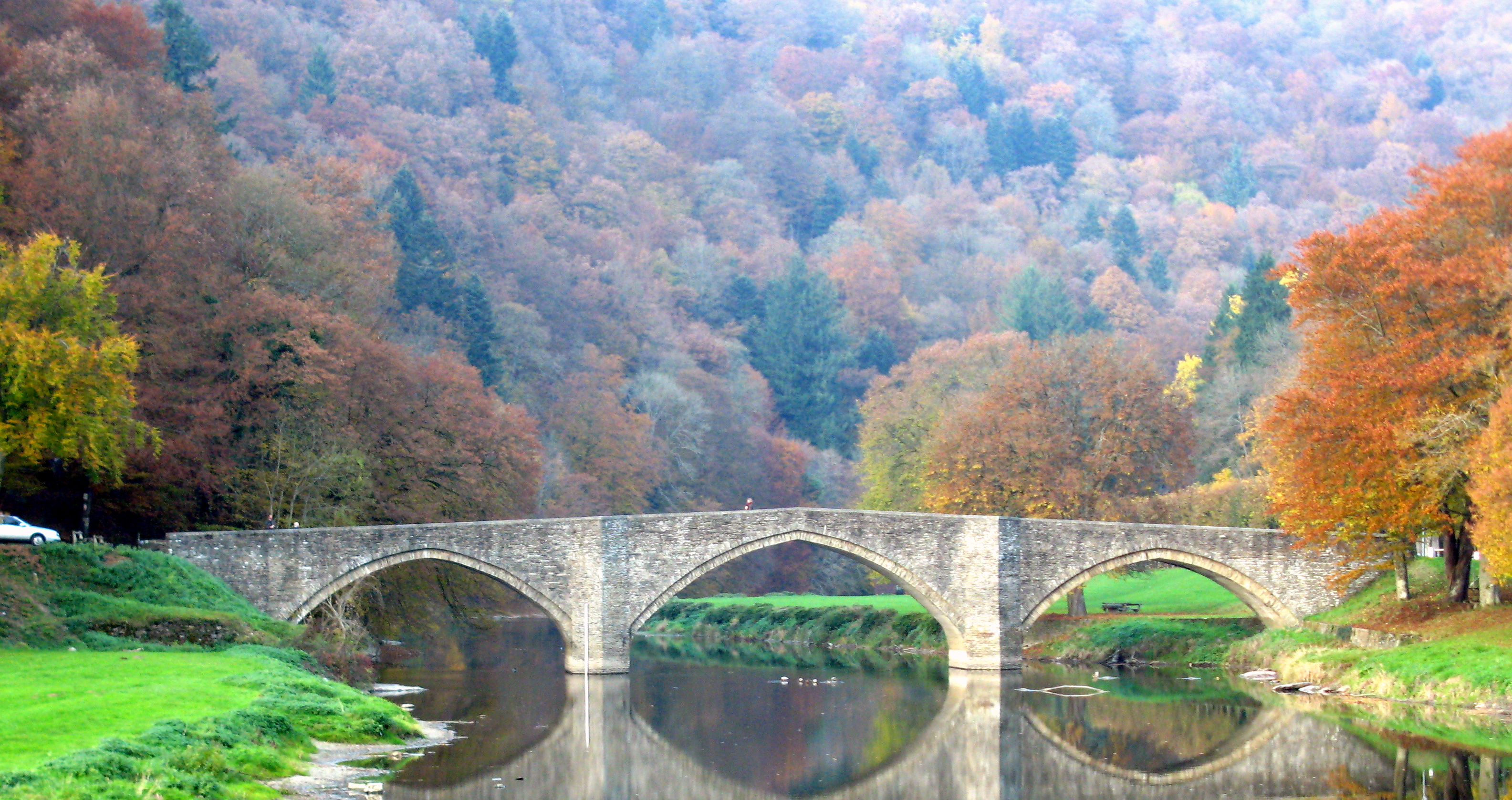 D'Bréck iwwer d'Semois zu Bouillon déi bei d'Klouschter Notre-Dame de Clairfontaine féiert